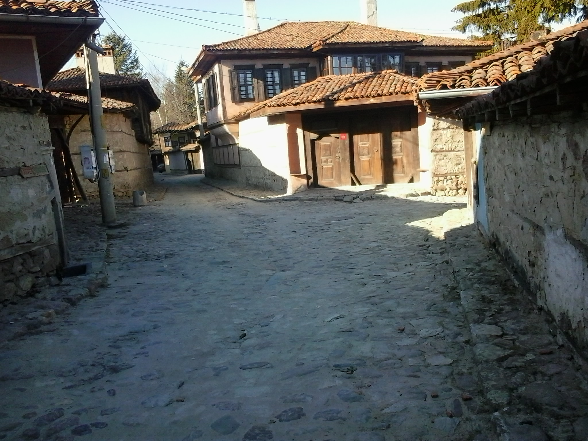 Старирадева къща